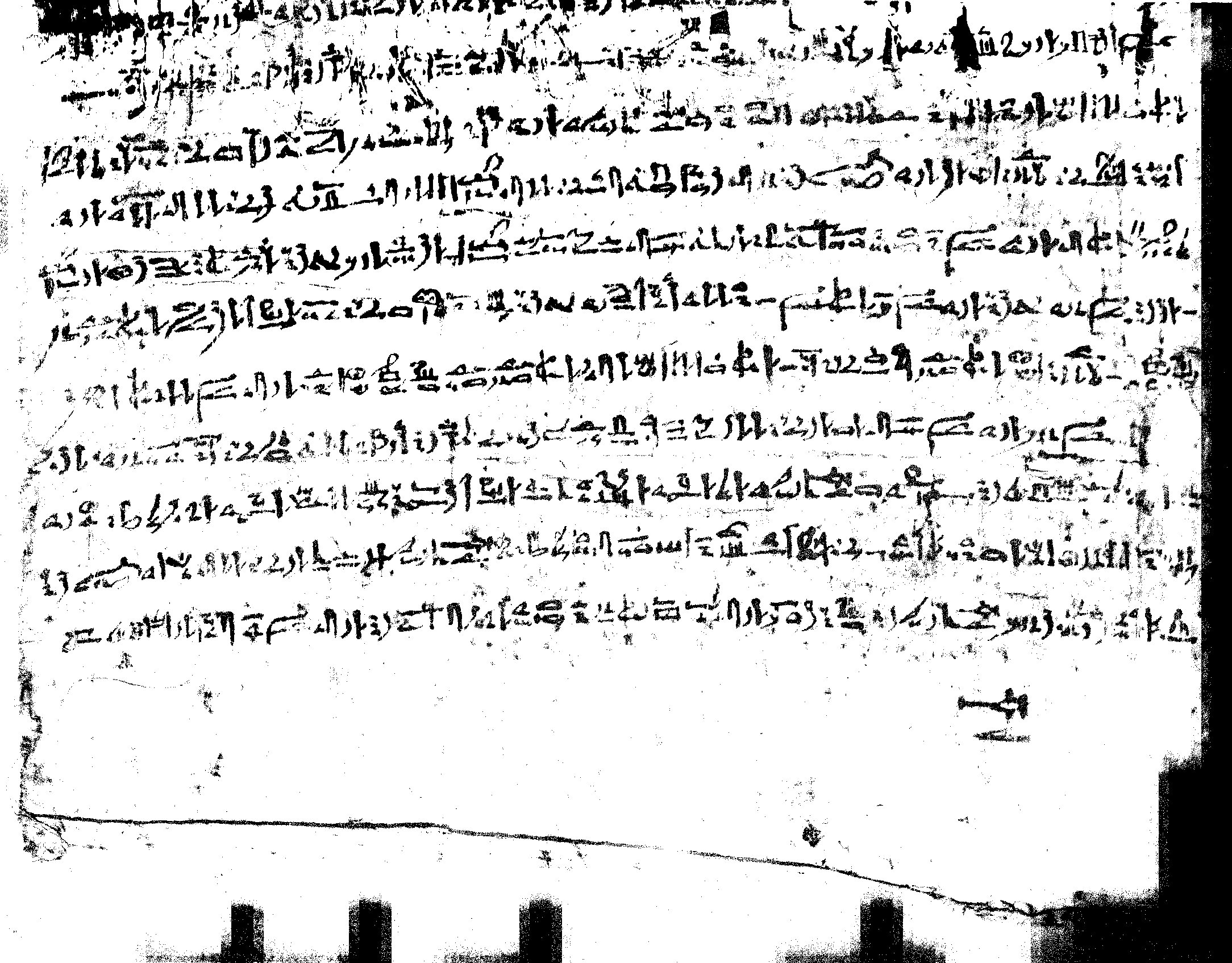 Foto der letzten Seite des Papyrus Moskau 120, der die Geschichte des Wenamun enthält